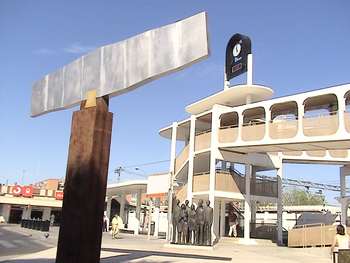 Monumento a las Víctimas del atentado del 11 de marzo de 2004; situado en la Plaza de la Estación de Alcalá de Henares (Comunidad de Madrid - España). Escultores: Miguel Ángel Sánchez y Jorge Varas. Inaugurado el 11 de marzo de 2005.